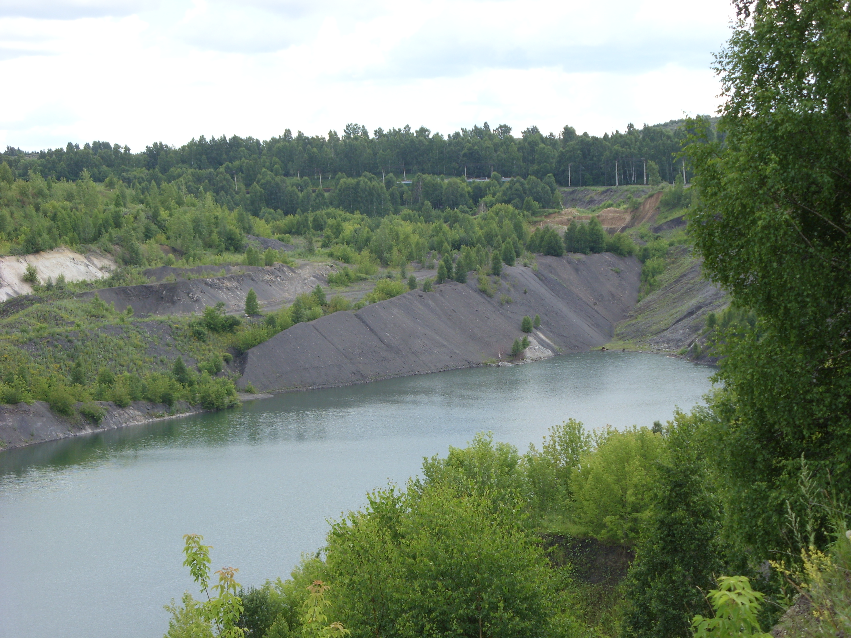 Киселевск. Красный Камень. Водоем "Красный Кузбасс"